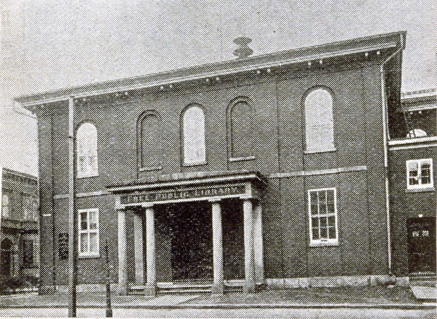 Les bibliothèques publiques de Montréal Institut Fraser vue extérieure